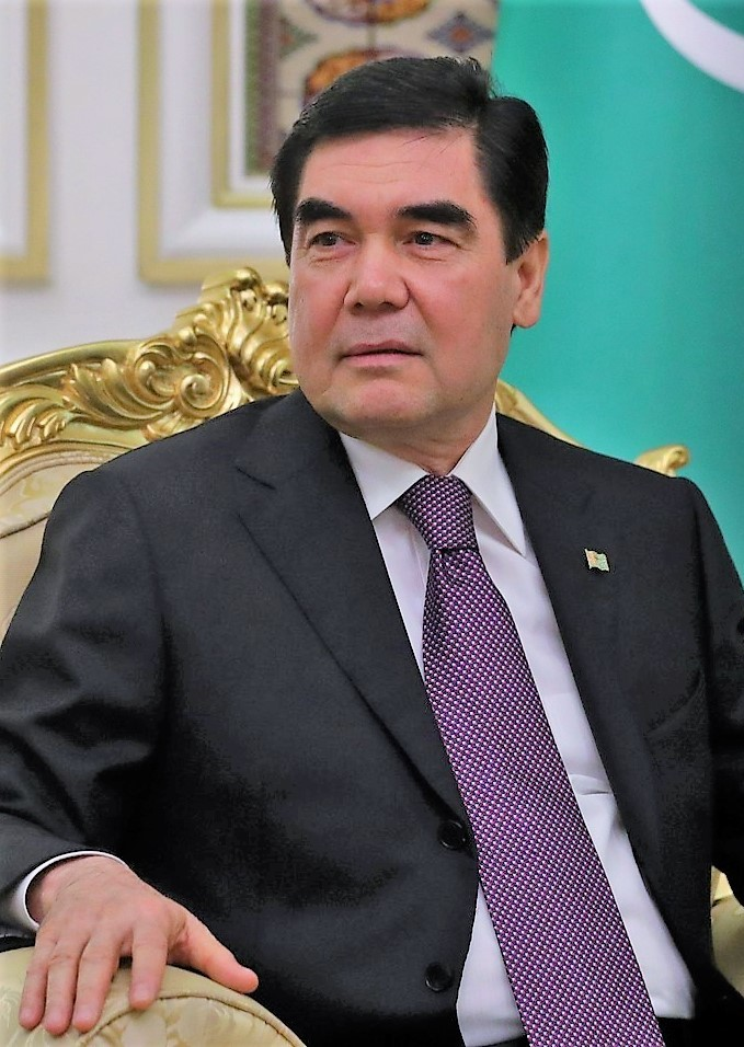 Президентом Туркменистана Гурбангулы Бердымухамедовым во время встречи с Президентом России Владимиром Путиным